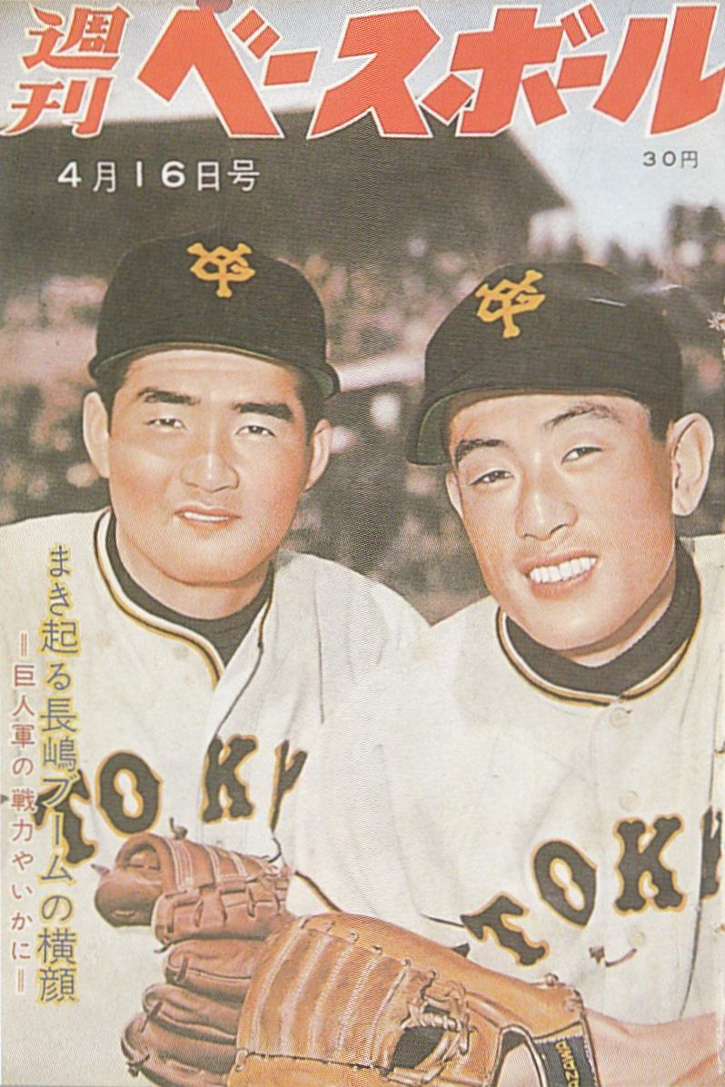 週刊ベースボールの創刊号（1958年4月16日号）表紙。